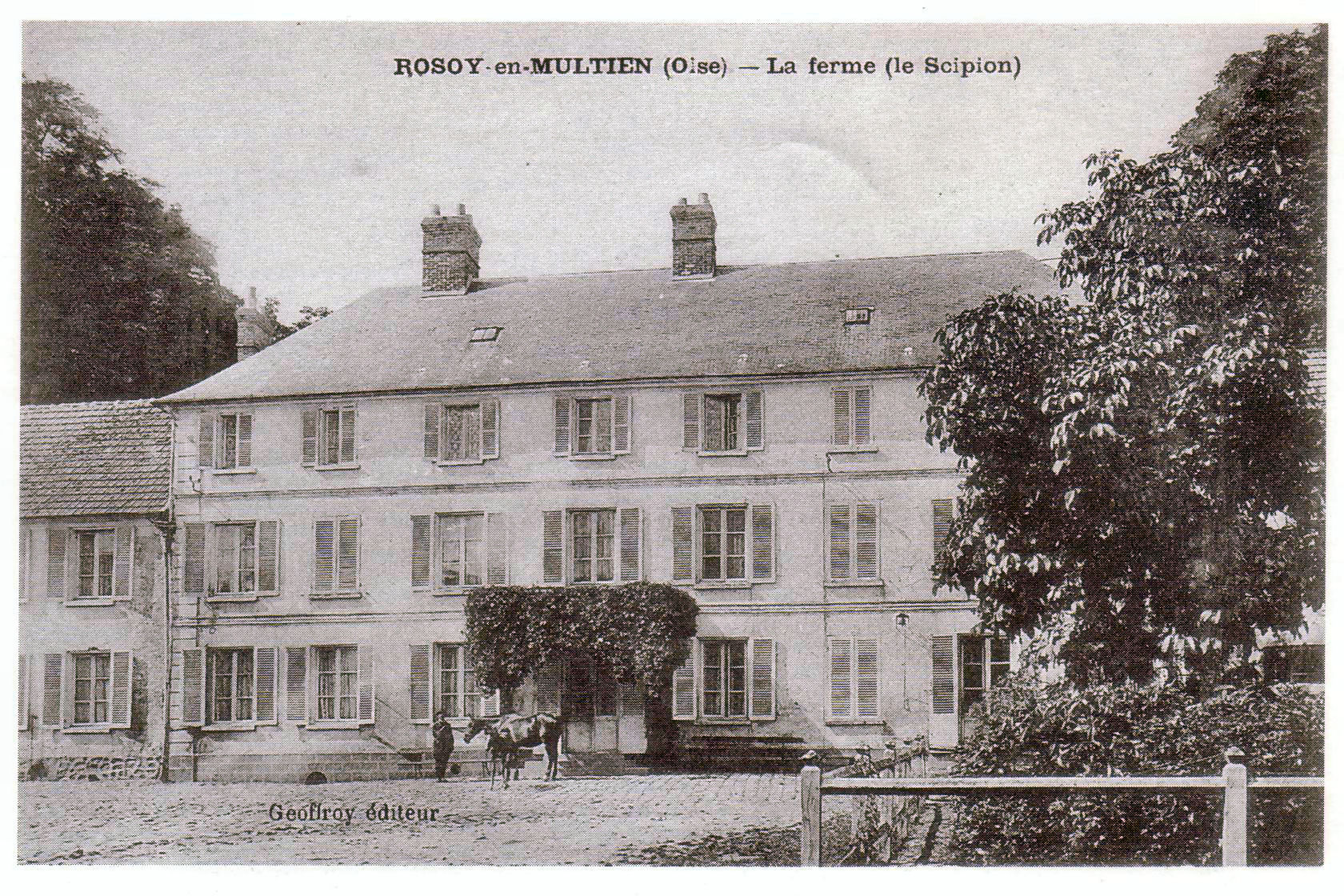 Gentilhommière 1805 dans cour intérieure